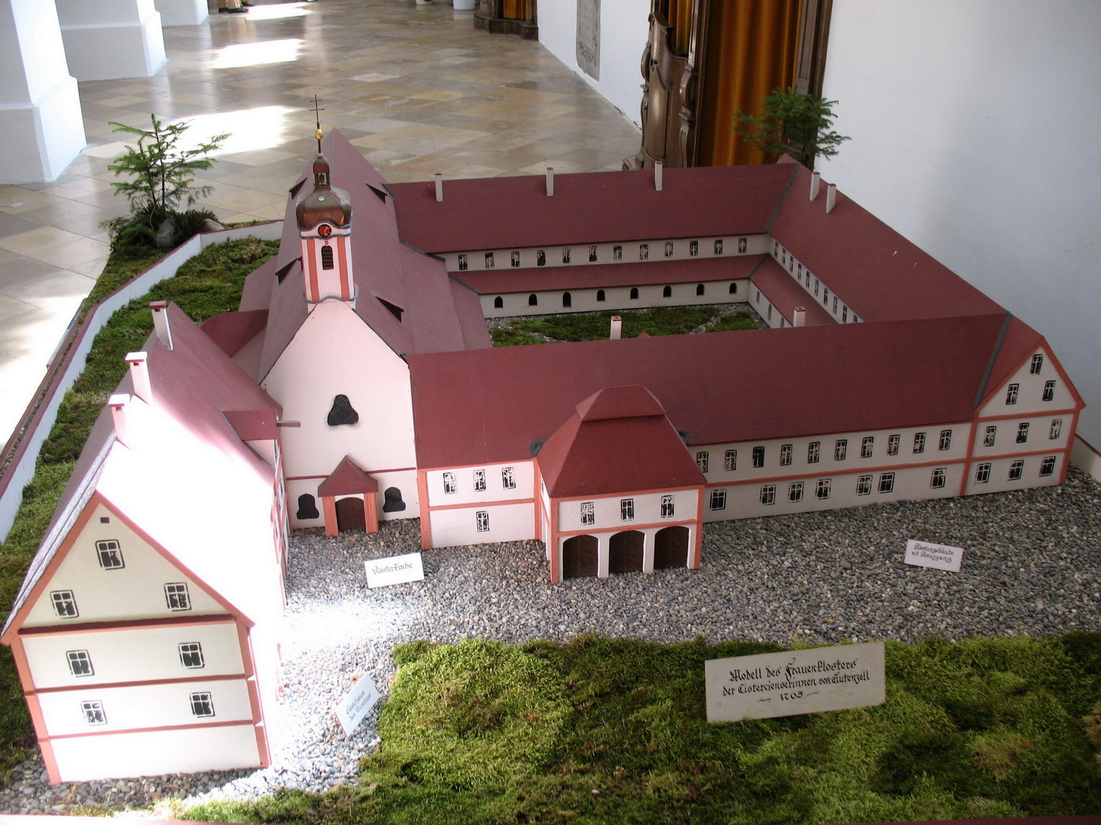 Modell der ehemaligen Klosteranlage von Gutenzell. Das Modell zeigt die Anlage zu Beginn des 18. Jahrhunderts. Links im Vordergrund das Gästehaus, mittig die Kirche und das Klostergebäude mit Kreuzgang.